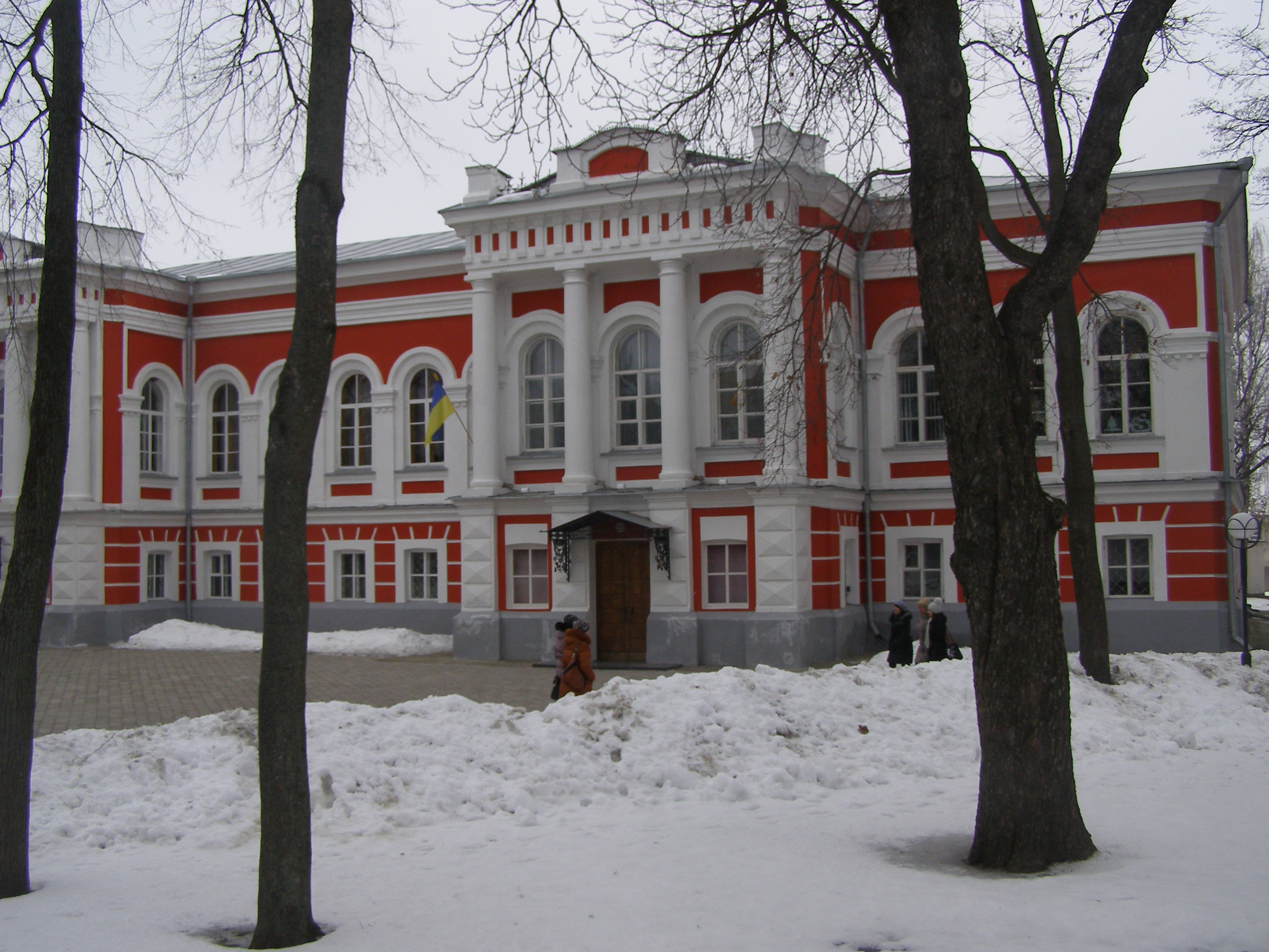 Глухівська чоловіча гімназія, Глухів, вул. Києво-Московська, 24